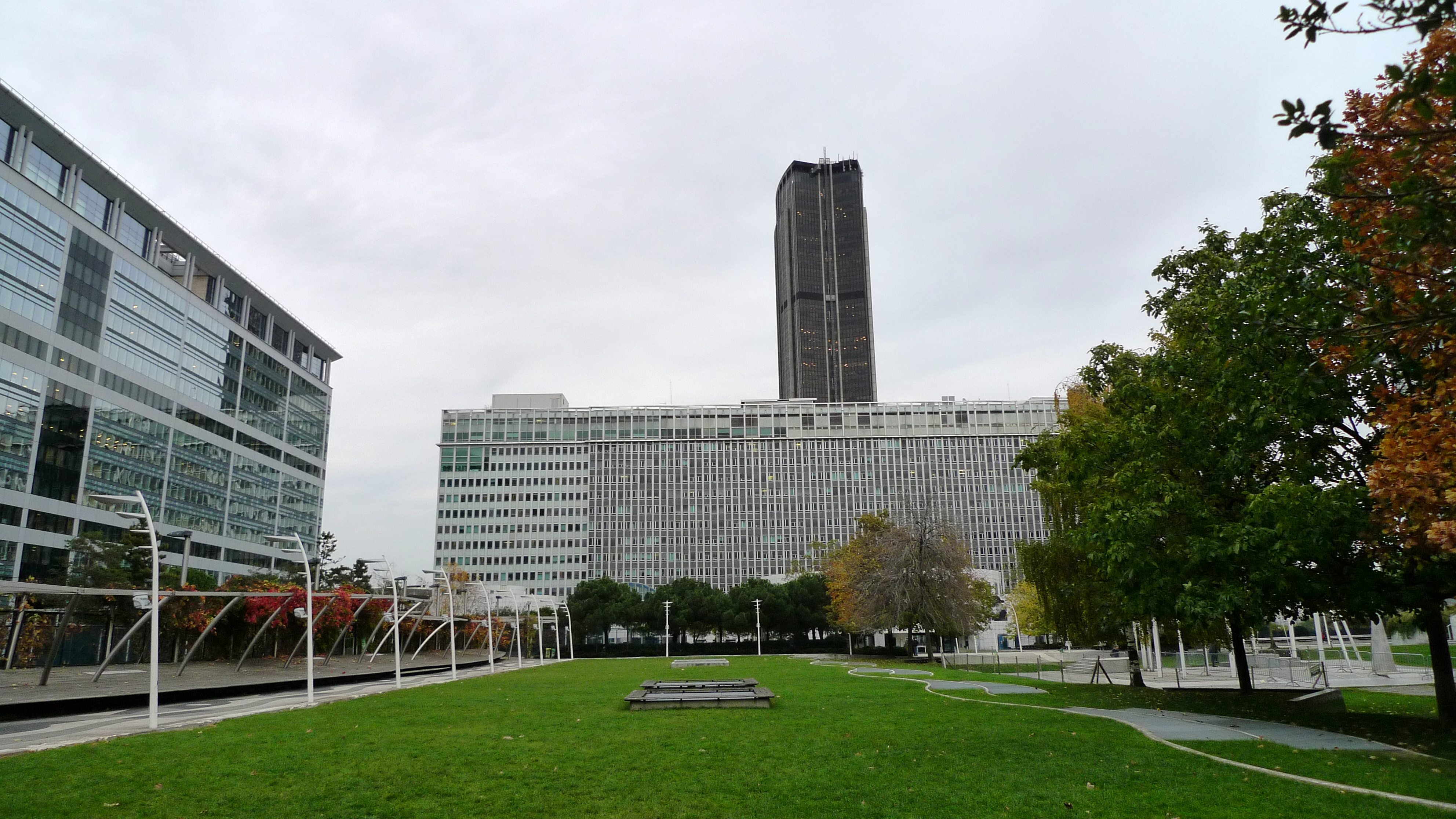 Construit en 1994 au dessus des voies de la Gare Montparnasse, il fait près de 3,5 hectares, et est recouvert d’une végétation dense et persistante. Il est entouré d’immeubles, ce qui en fait un endroit à l’abri du vent, et clos, presque intime.